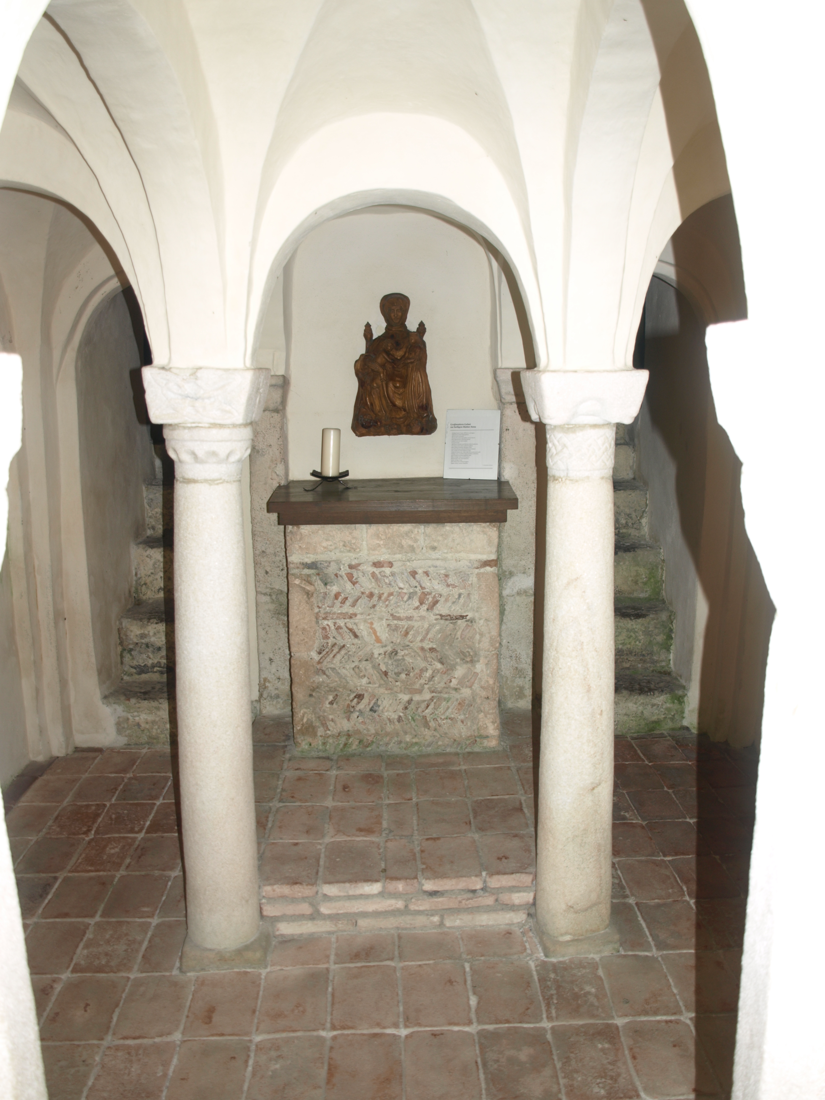 Kath. Pfarrkirche hl. Pantaleon